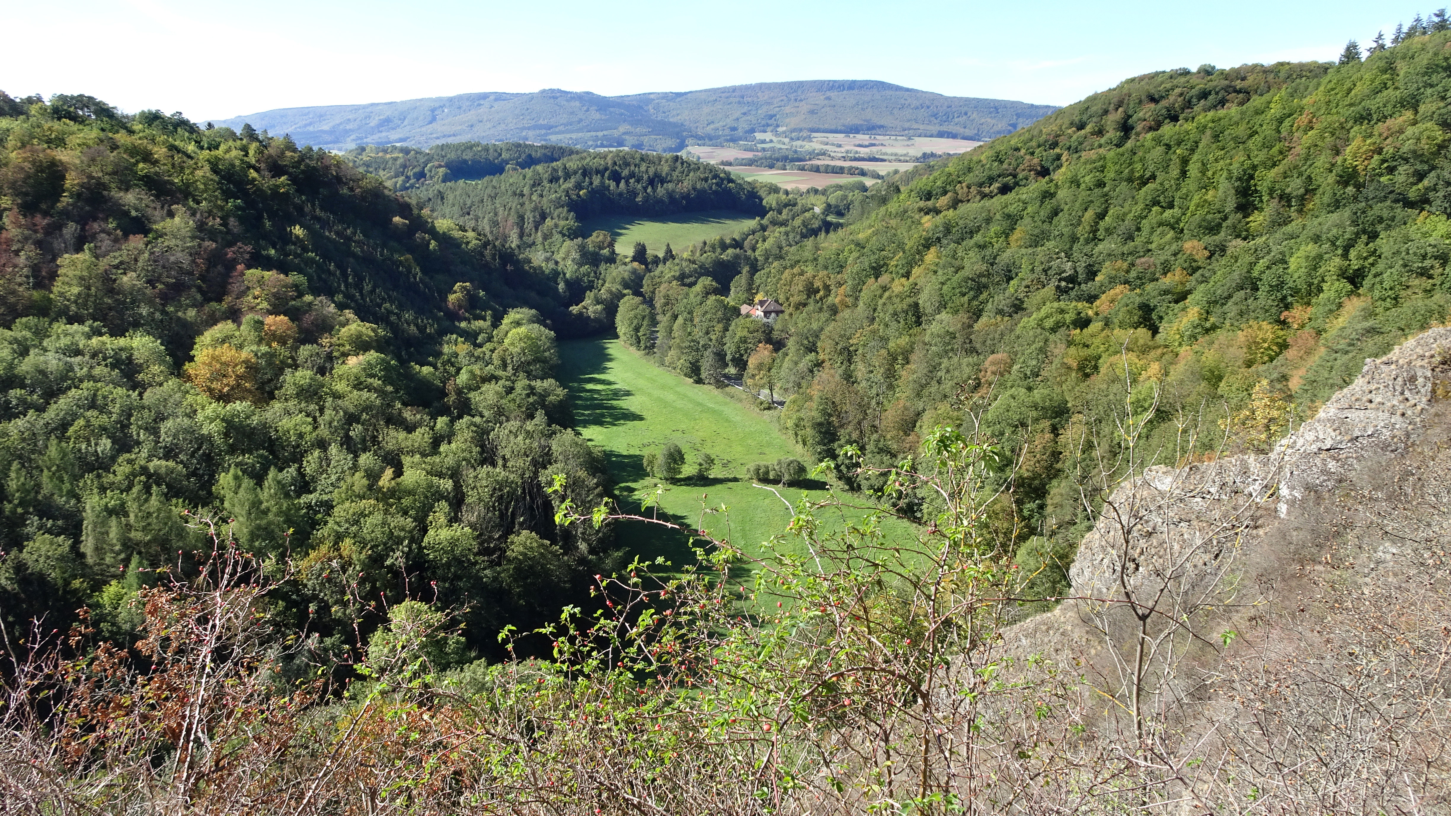 Blick über das Tal der Berka mit dem Gasthaus „Frau Holle“ bis zum Hohen Meißner. Die Geschichte der Burganlage, Stammsitz der einst bedeutenden Grafen Bilstein, geht bis in das Jahr 1120 zurück. Die einstige Grafenburg, die hier im frühen Mittelalter einen beherrschenden Platz einnahm, wurde wegen Baufälligkeit 1594 von den Landgrafen von Hessen abgerissen. Heute sind nur noch Mauerreste sichtbar. Die Burgruine Bilstein ist Kulturdenkmal aufgrund ihrer geschichtlichen Bedeutung. Der Bilstein liegt im östlichen Meißnervorland, im Gemeindegebiet des Eschweger Stadtteils Albungen im nordhessischen Werra-Meißner-Kreis. Das Gebiet gehört zum Geo-Naturpark Frau-Holle-Land.